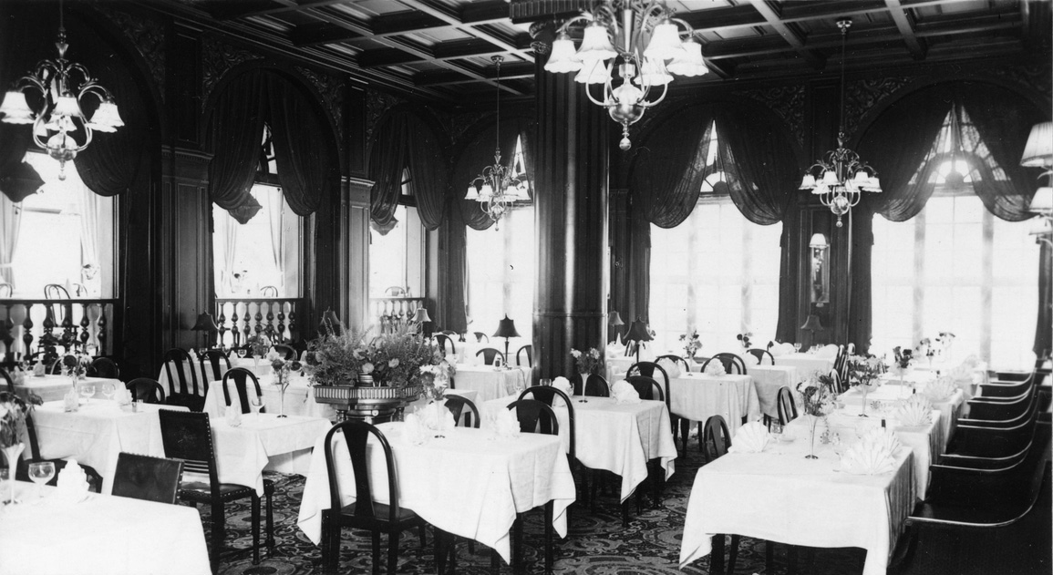 Restaurang Metropol, 1926